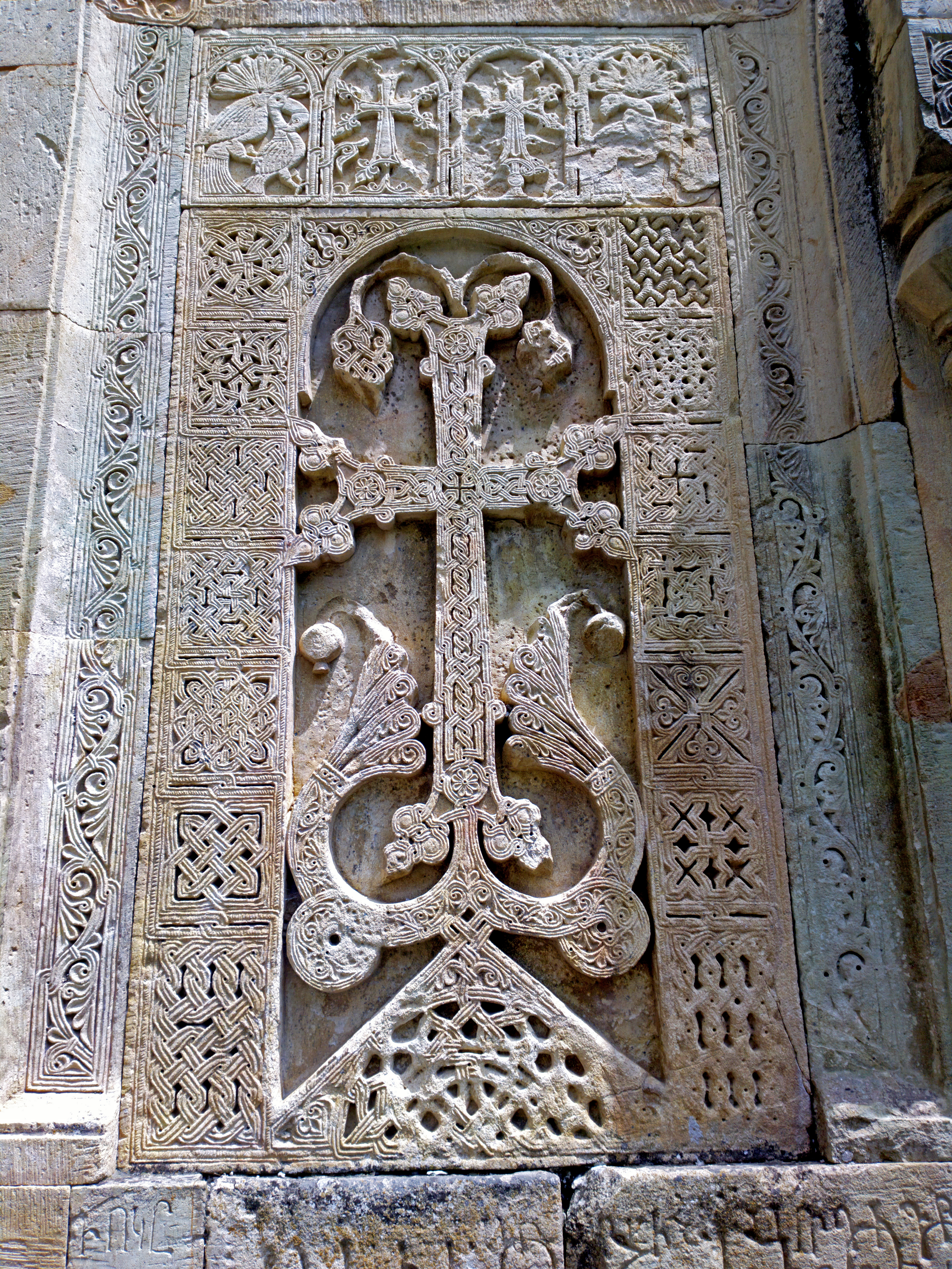 Վանական Համալիր Նոր Վարագավանք (Անապատ) 60/10